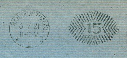 Postfreistempel mit Zierfeld